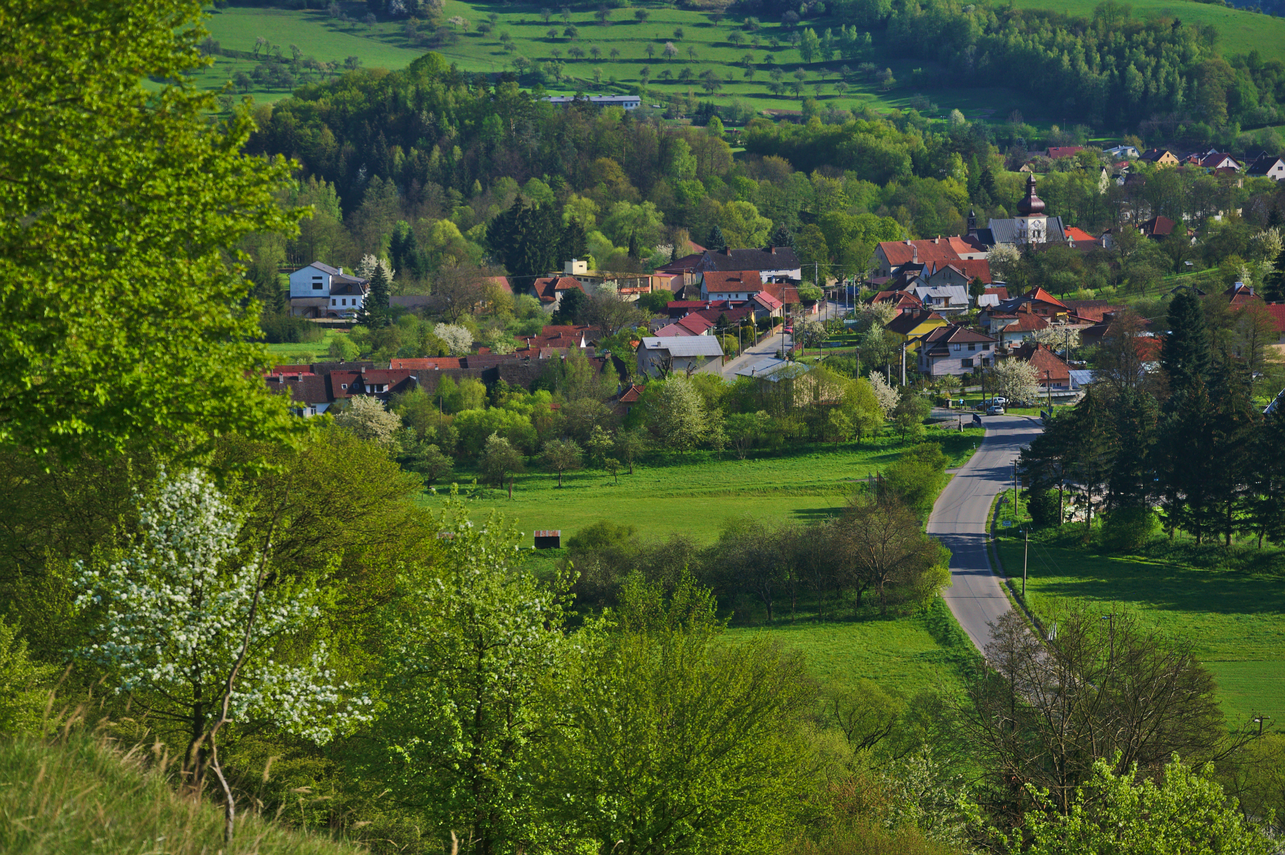 Pohled na vesnici ze severu, Štěpánov nad Svratkou, okres Žďár nad Sázavou